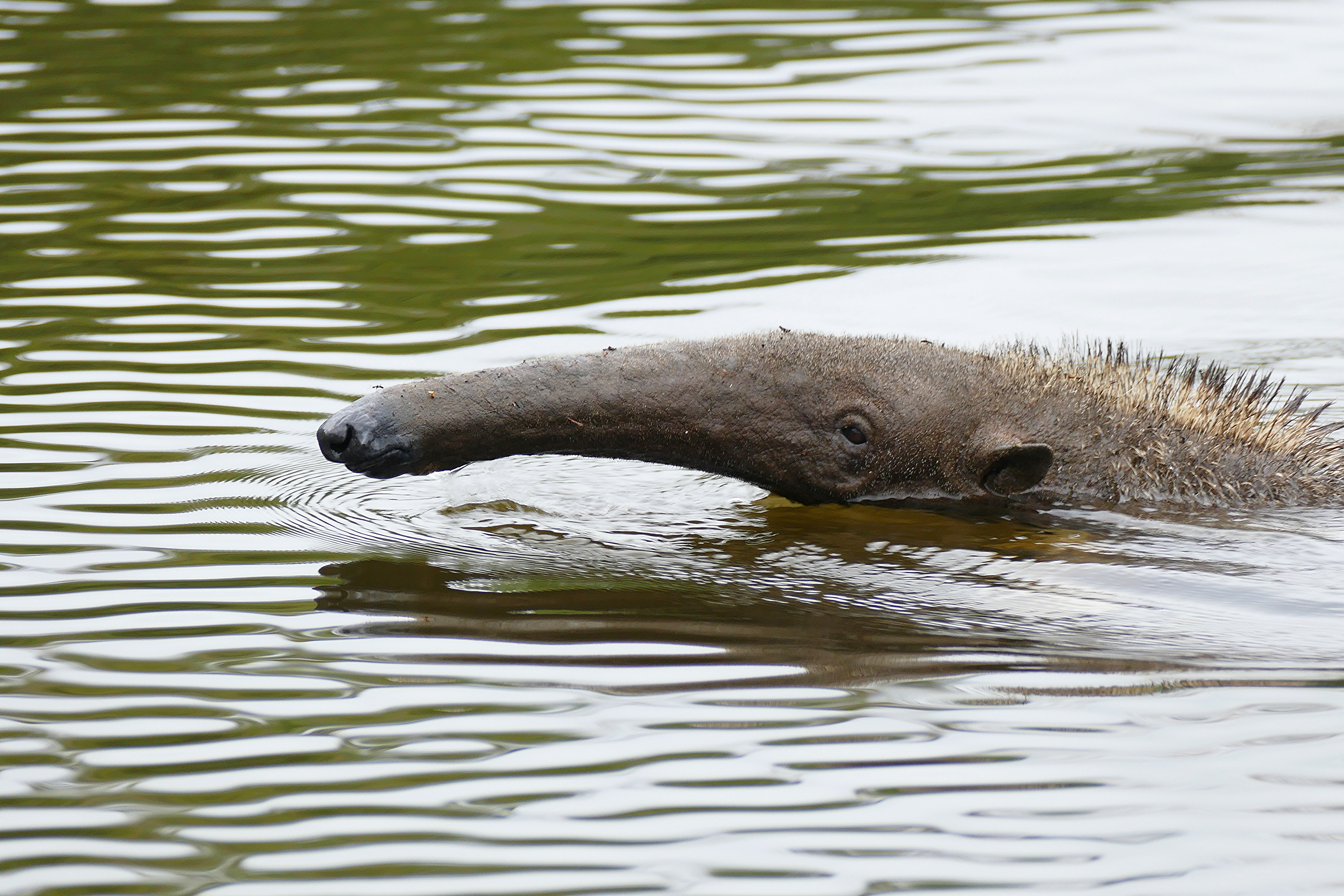 Pixaim River, Transpantaneira, Poconé, Mato Grosso, BRAZIL